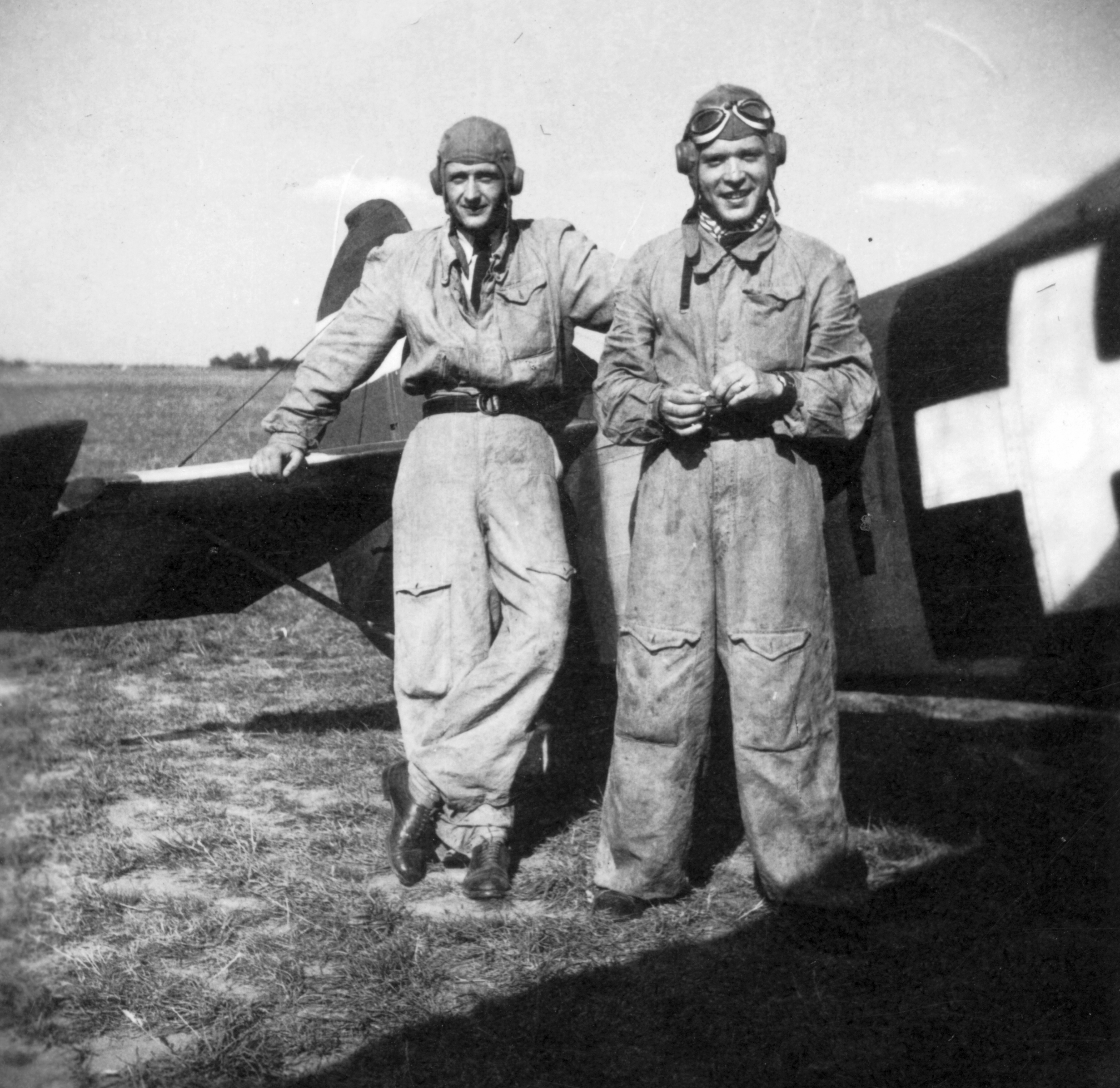 A Magyar Királyi Honvéd Légierő Fiat Cr-32 típusú vadászgépe. Tags: Royal Hungarian Air Force, airplane, pilot, military, Fiat-brand, Italian brand, overall Title: A Magyar Királyi Honvéd Légierő Fiat Cr-32 típusú vadászgépe.